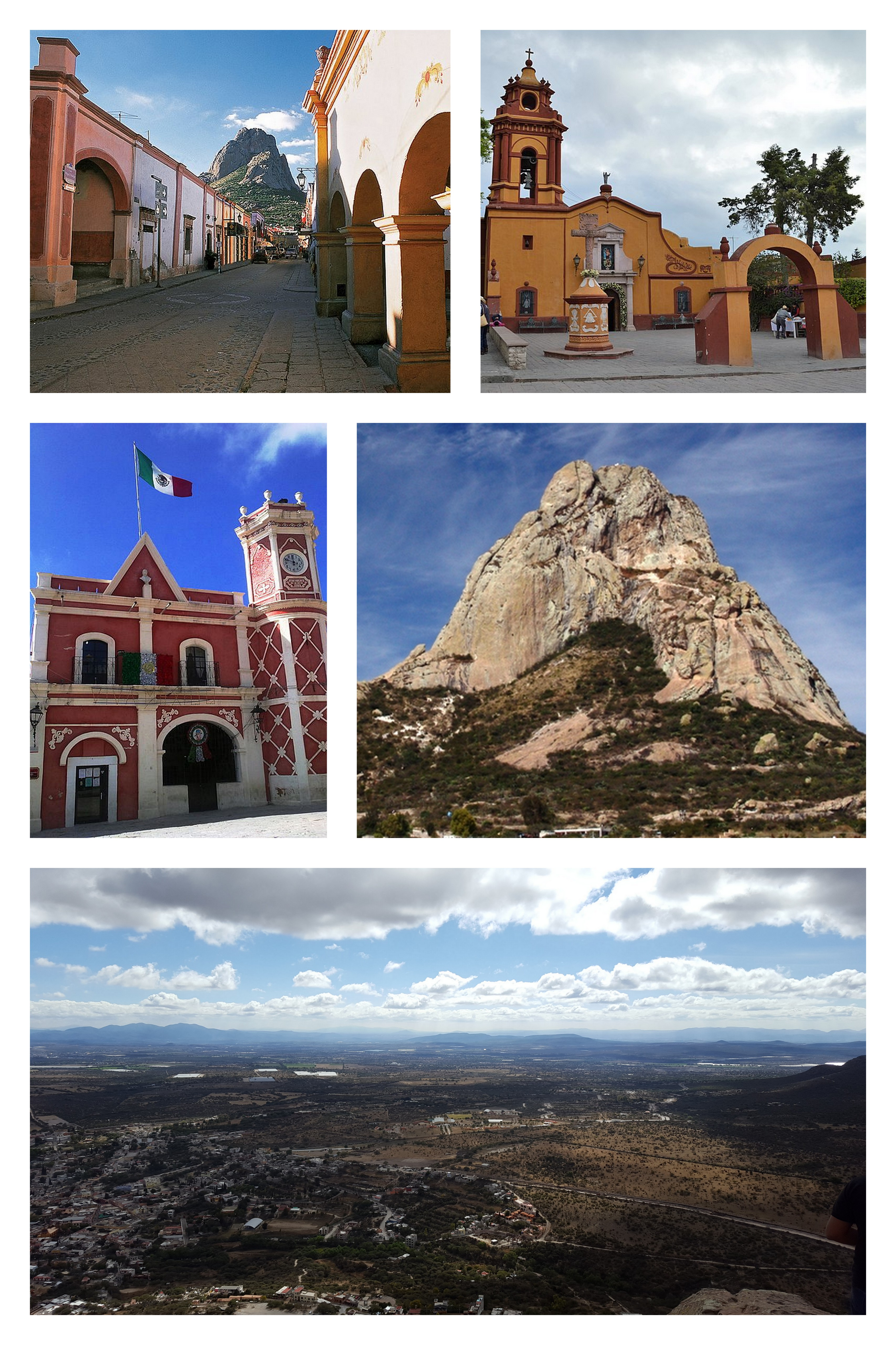 Montaje creado a partir de cinco imágenes en Wikimedia Commons: File:Presidencia de Peña de Bernal, Querétaro.jpg File:Calle Miguel Hidalgo, Peña de Bernal, Querétaro (24172169019).jpg File:BernalQRO014.jpg File:La Peña desde el Pueblo de Bernal.JPG File:Bernal panorámica.jpg